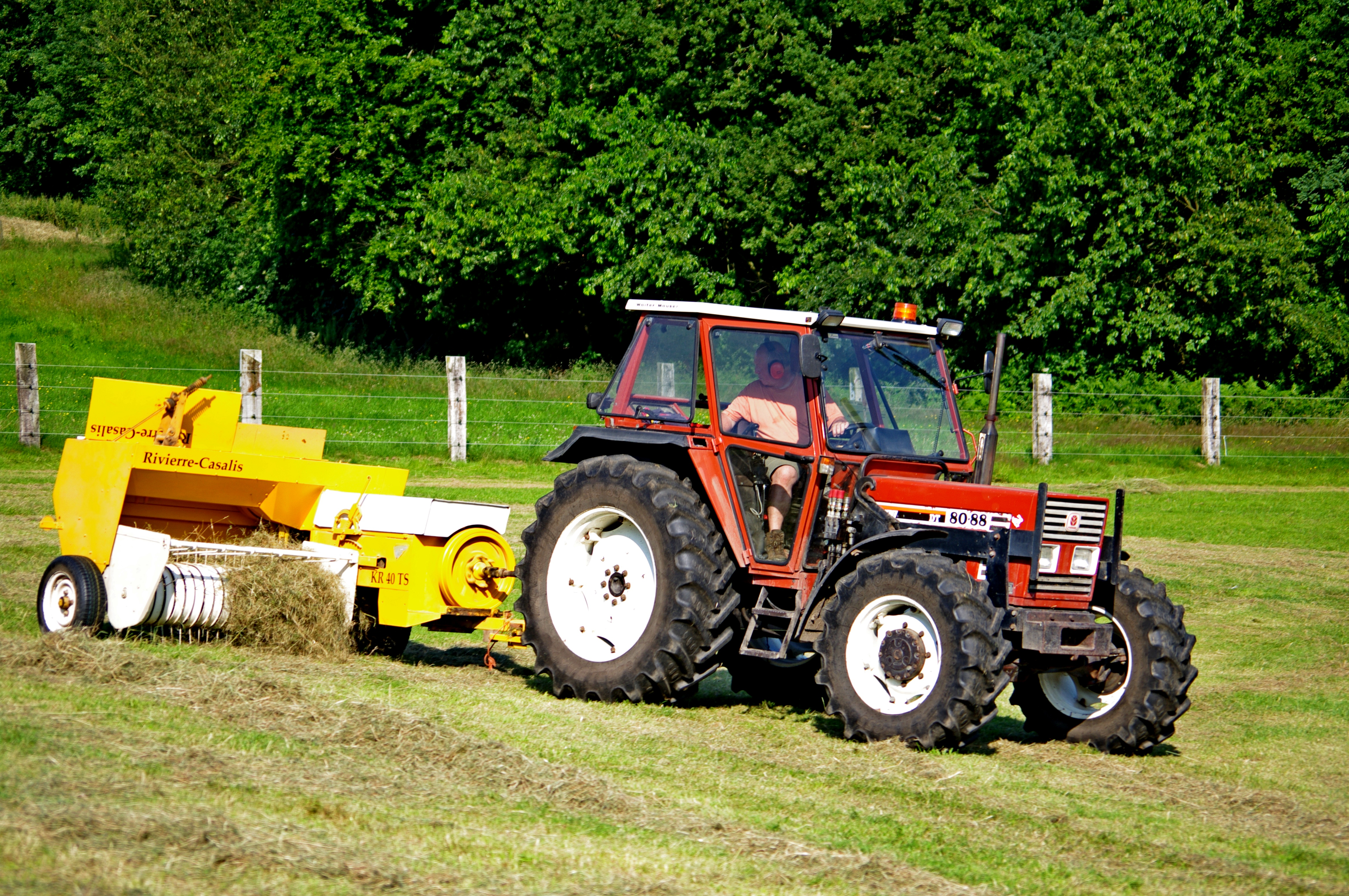 Fiatagri 80-88 DT von 1992 und Kleinballen Presse von 1981 der Marke Rivierre Cassalis